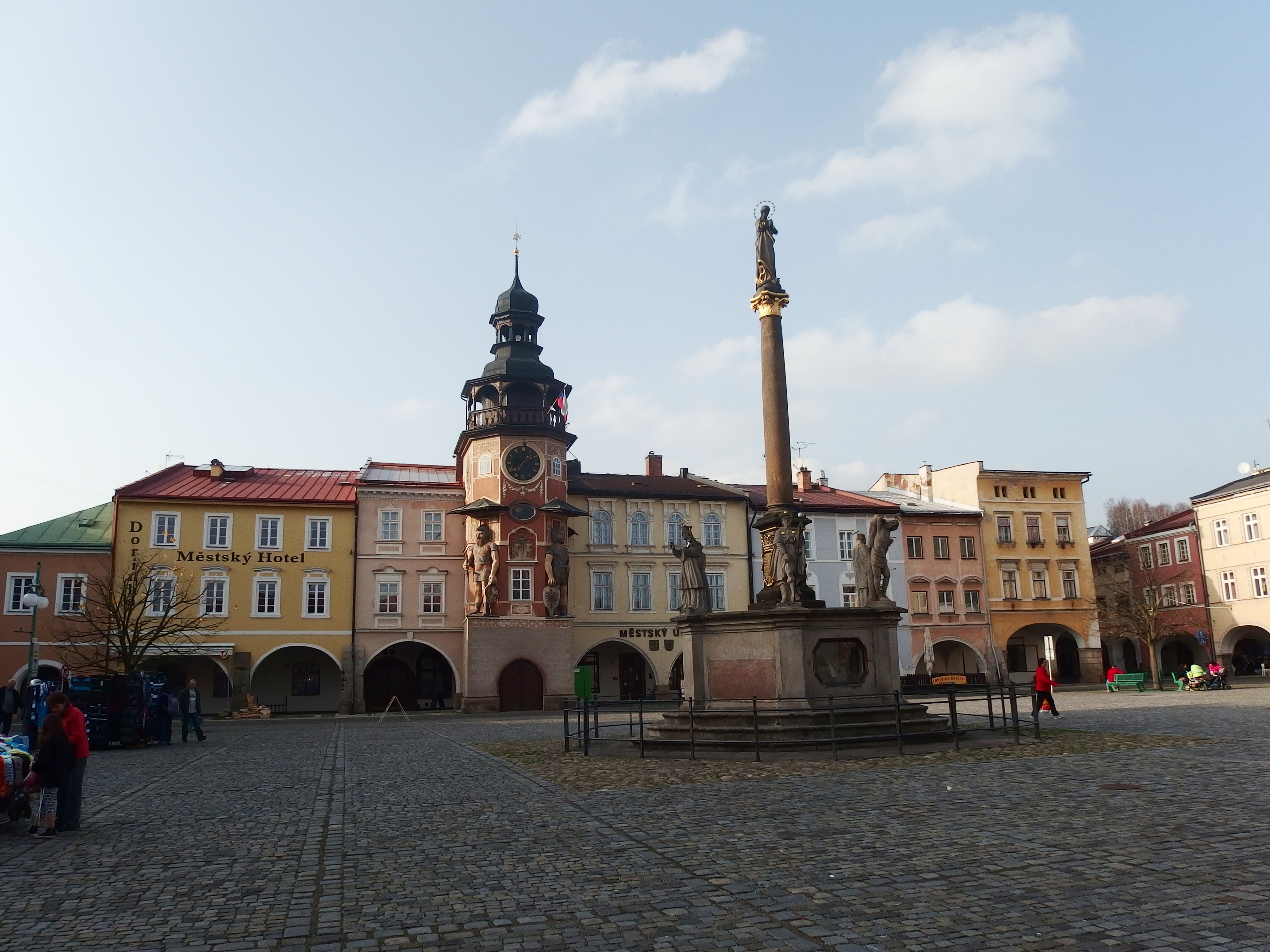 Mariánský sloup, Náměstí, Hostinné.